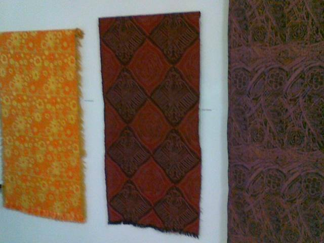 Tkaniny projektu Heleny Bukowskiej